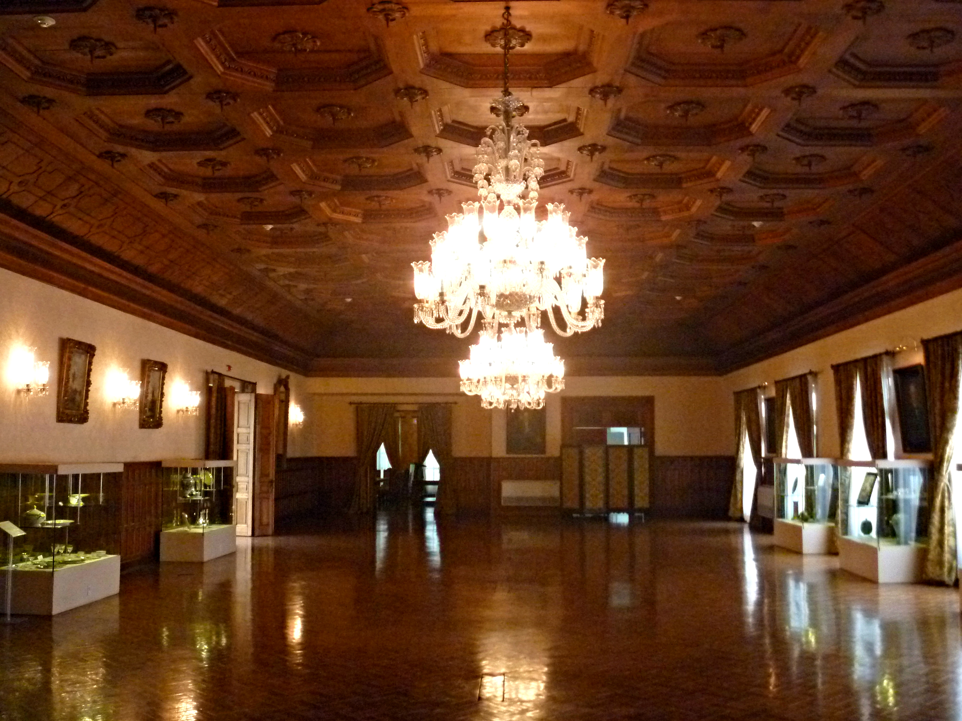 Salón de Banquetes, también conocido como Salón de Baile, del Palacio de Carondelet en la ciudad de Quito DM.